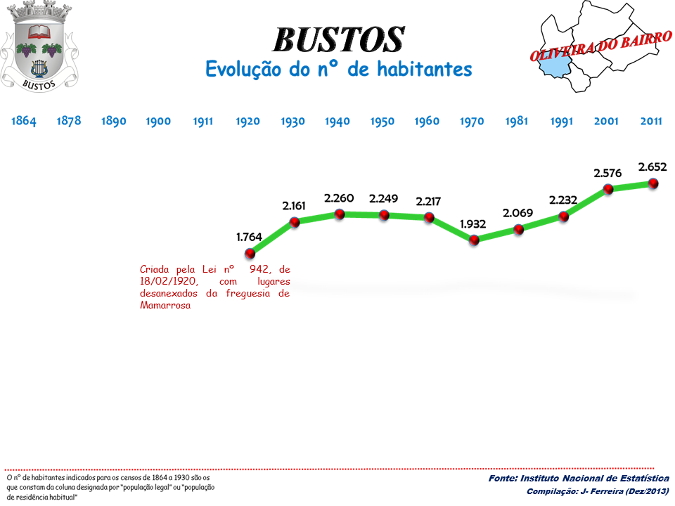 Evolução da População 1864 / 2011